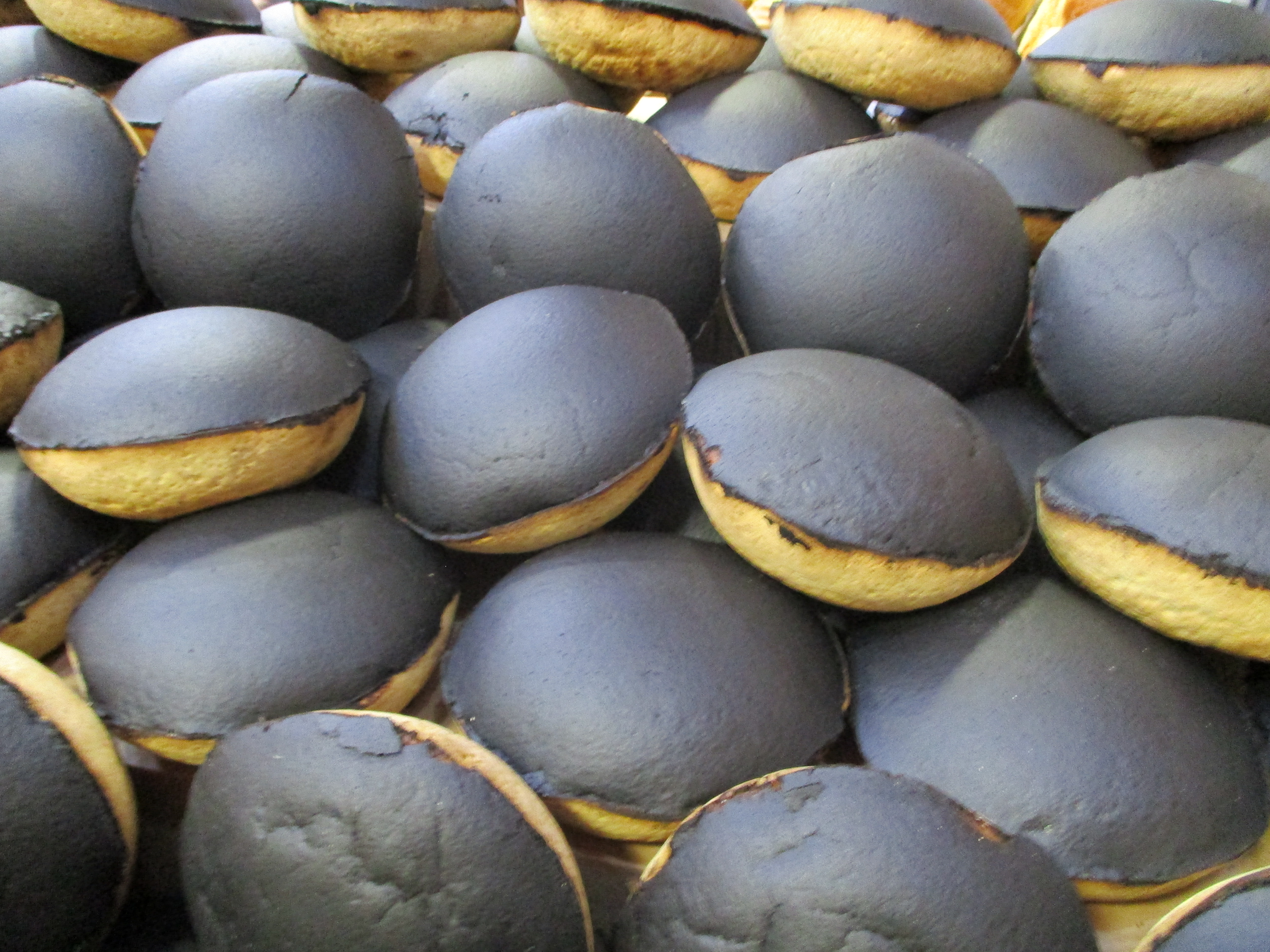 Tourteaux fromagés au SIA 2019.